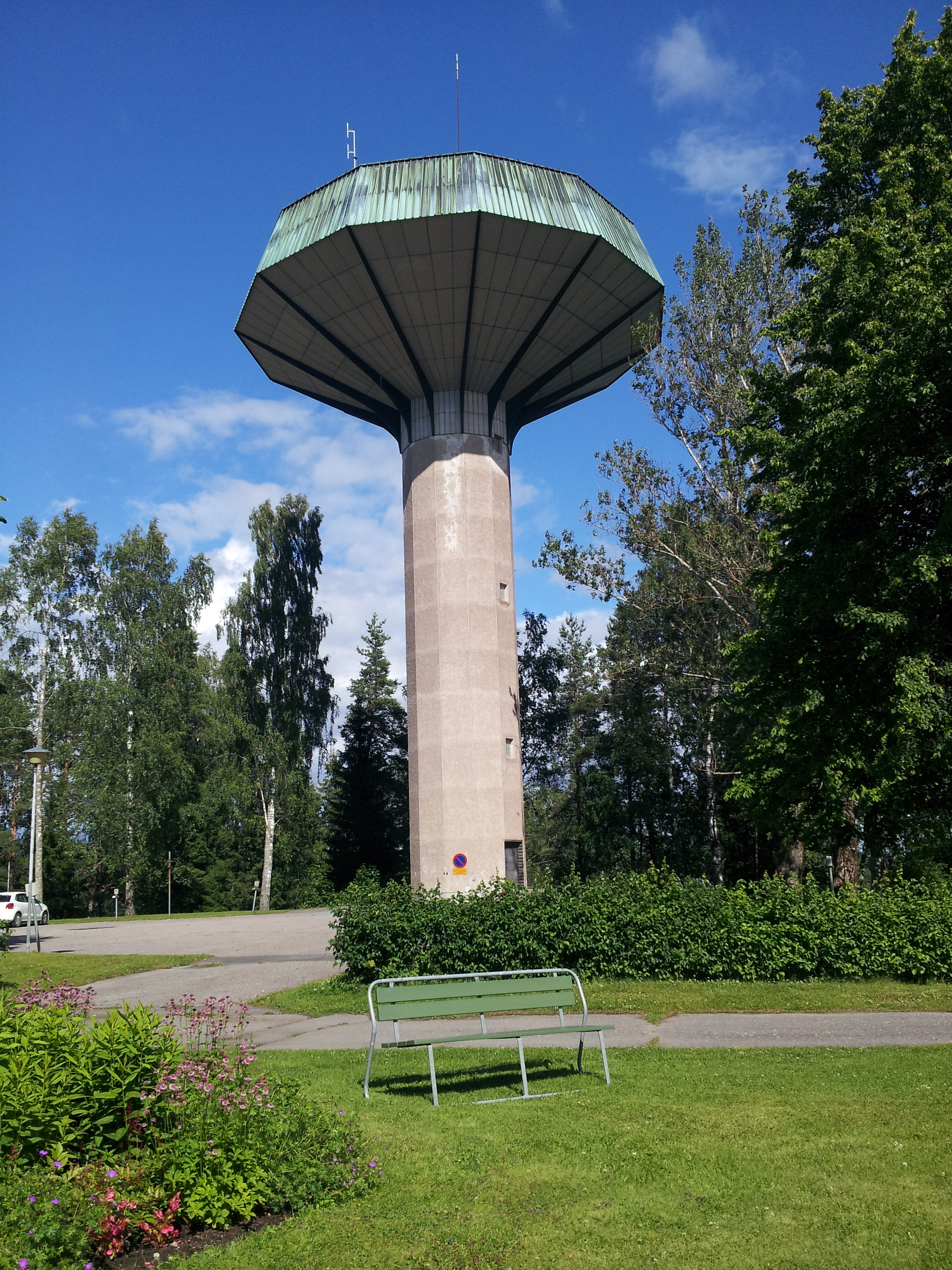 Joutsenon vesitorni Saimaantieltä kuvattuna